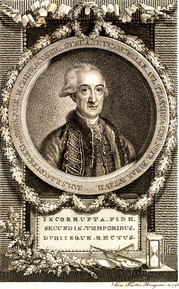 széki gróf Teleki Sámuel (Gernyeszeg, 1739. november 17. – Bécs, 1822. augusztus 7.) erdélyi kancellár.